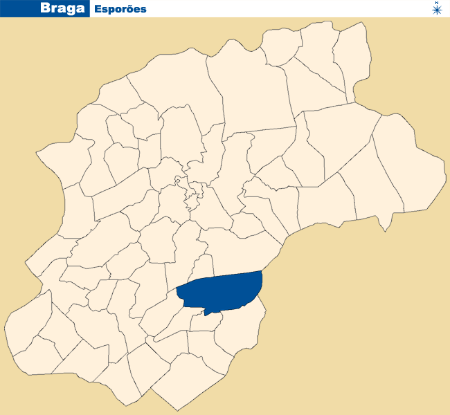 Localização de Esporões no concelho de Braga.